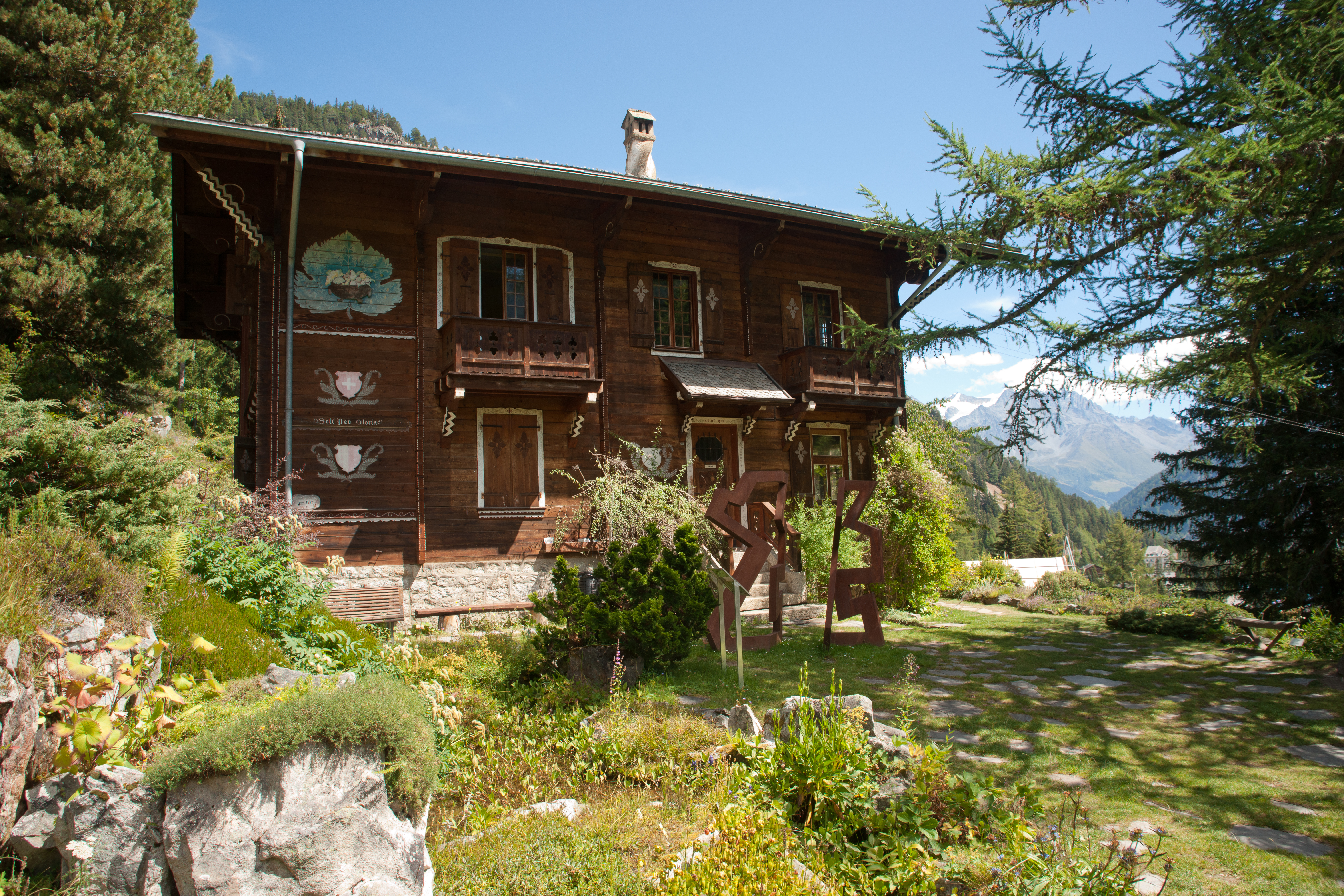 Jardin botanique alpin Flore-Alpe